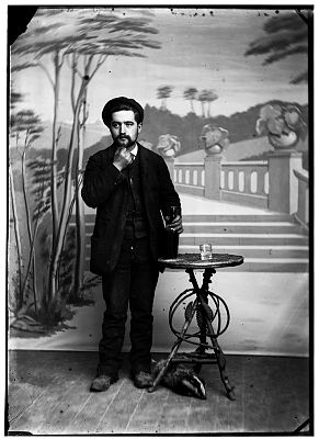 Foto d'estudiu (1981-1984). El vasu sidre, asemeyáu a los d'anguaño, apaez de manera esplícita na semeya ya daquella como símbolu d'identidá